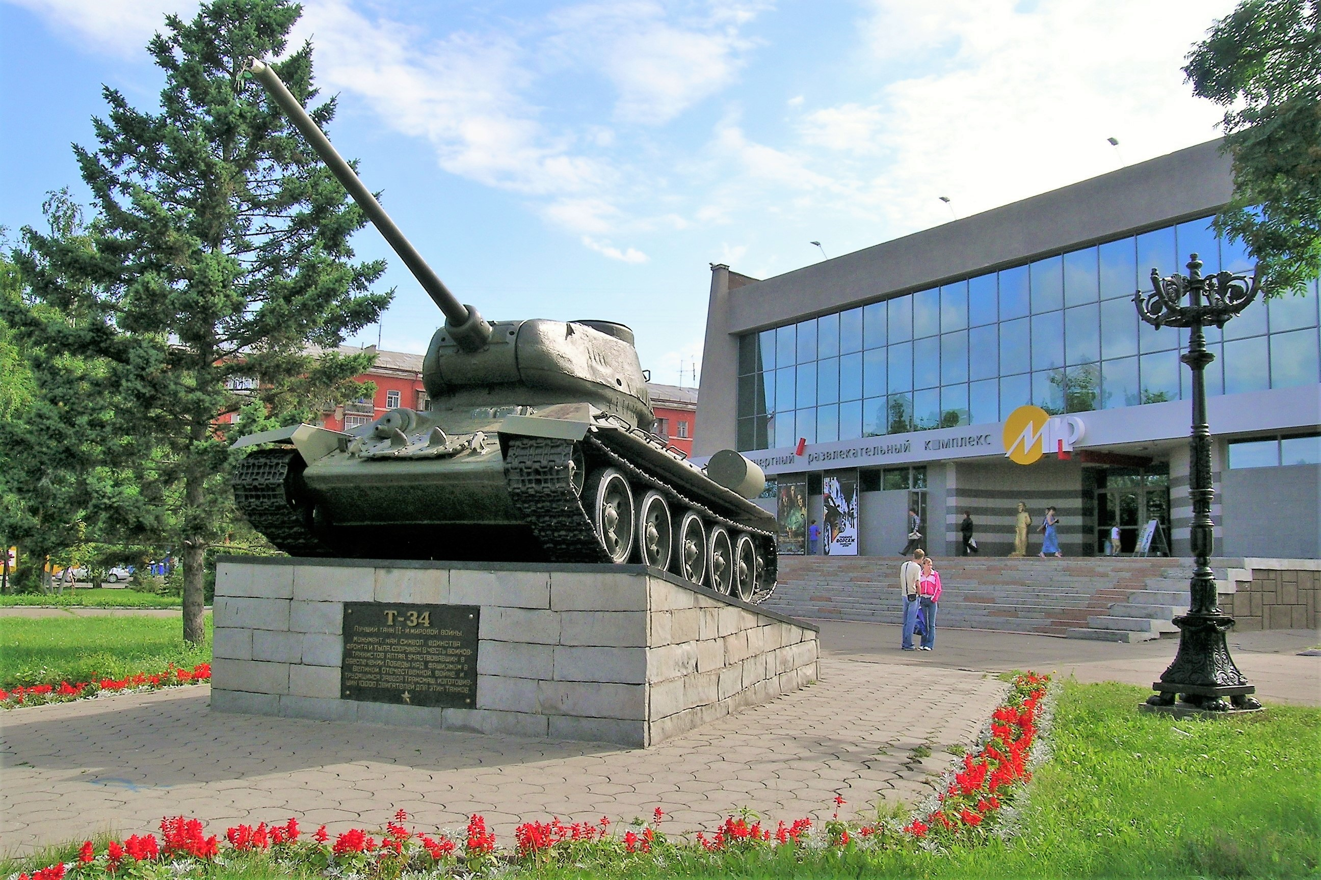 Barnaul. Mir Cinema. Photograph taken in 2006. Барнаул. Кинотеатр "Мир".